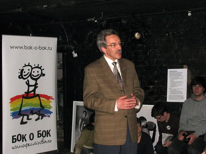 Уполномоченный по правам человека в Петербурге А. В. Шишлов на кинофестивале "Бок о бок"